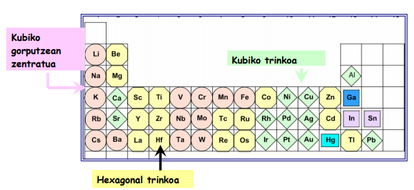 Metalen egitura kristalinoa